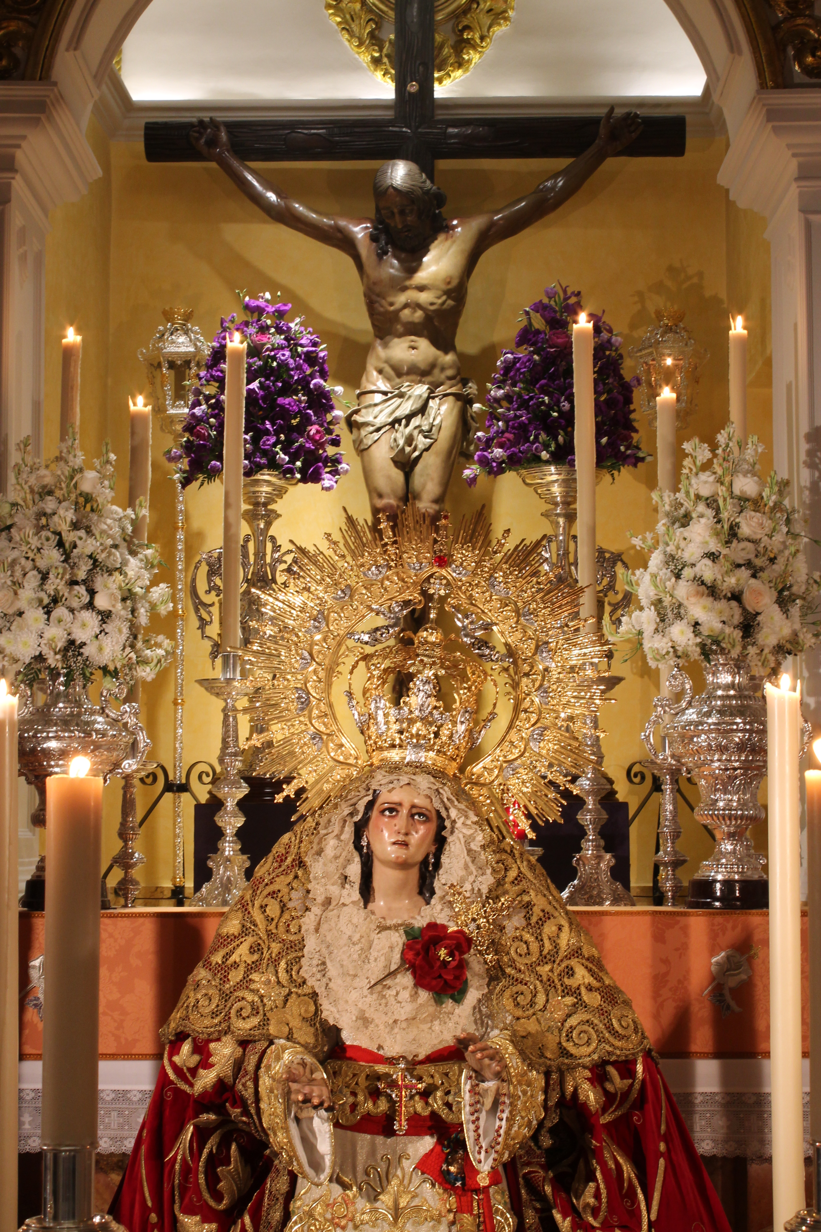 Fotografía realizada durante la Mater Dei de Málaga.